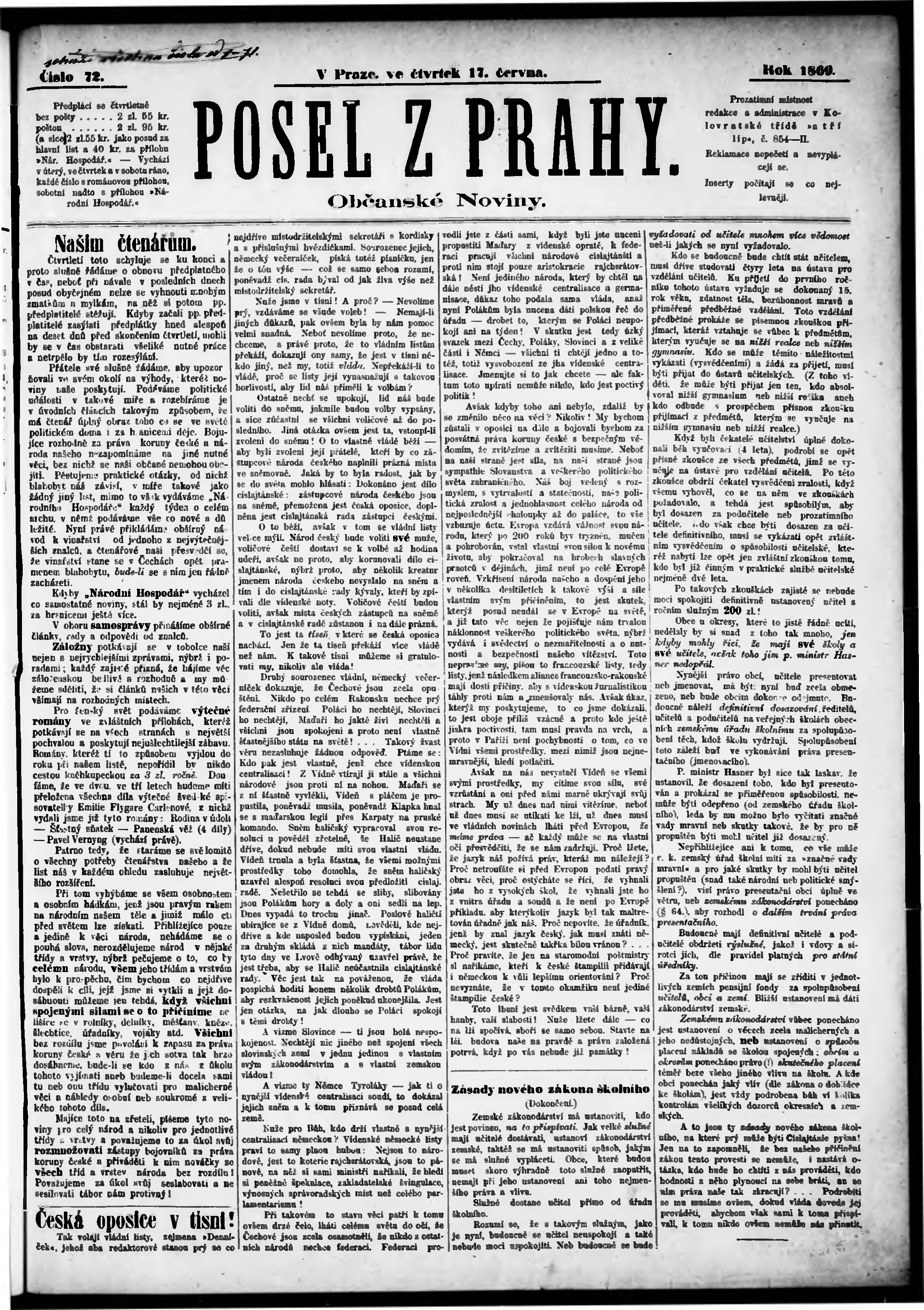 Posel z Prahy, 1869_06_17, str. 1